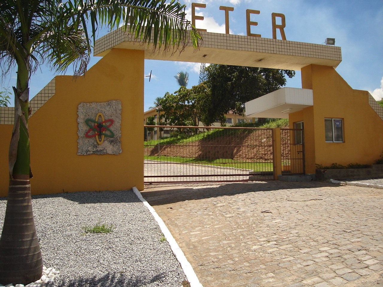 Escola Técnica Redentorista.jpg, Campina Grande, Brasil.